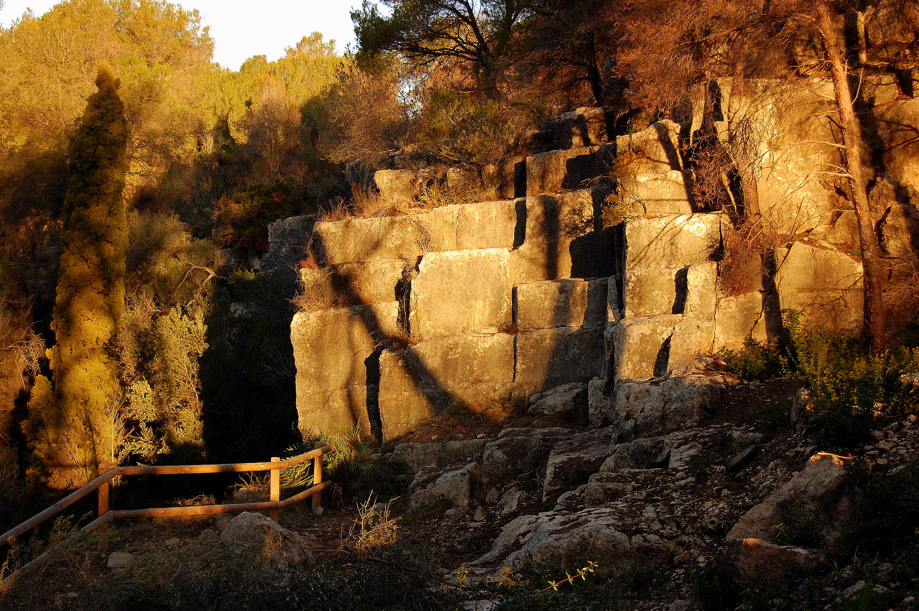 Pedrera romana per extreure el material necessari per les obres de Tarraco.